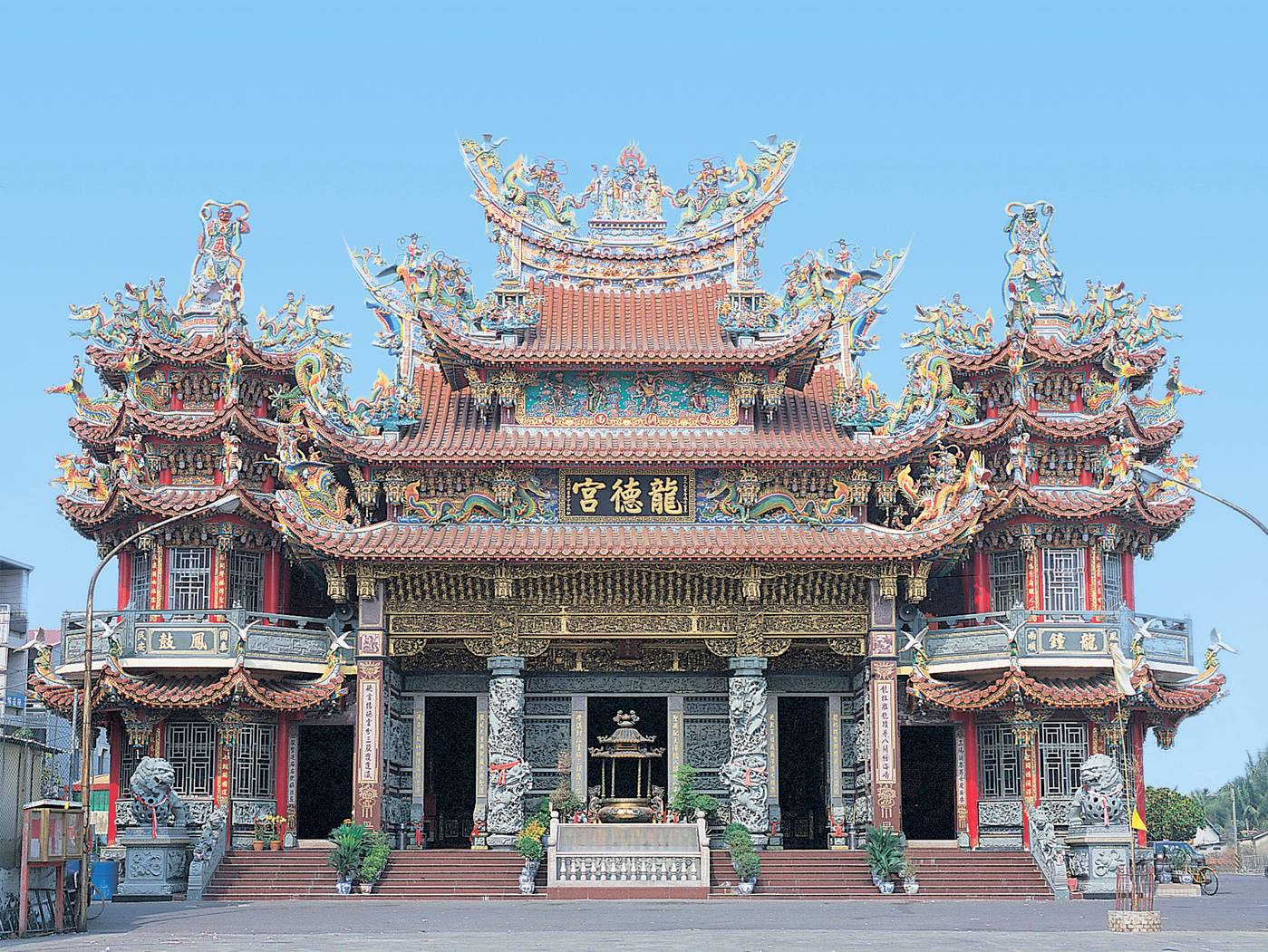 三股龍德宮重建竣工照，於西元1995年重建完成。